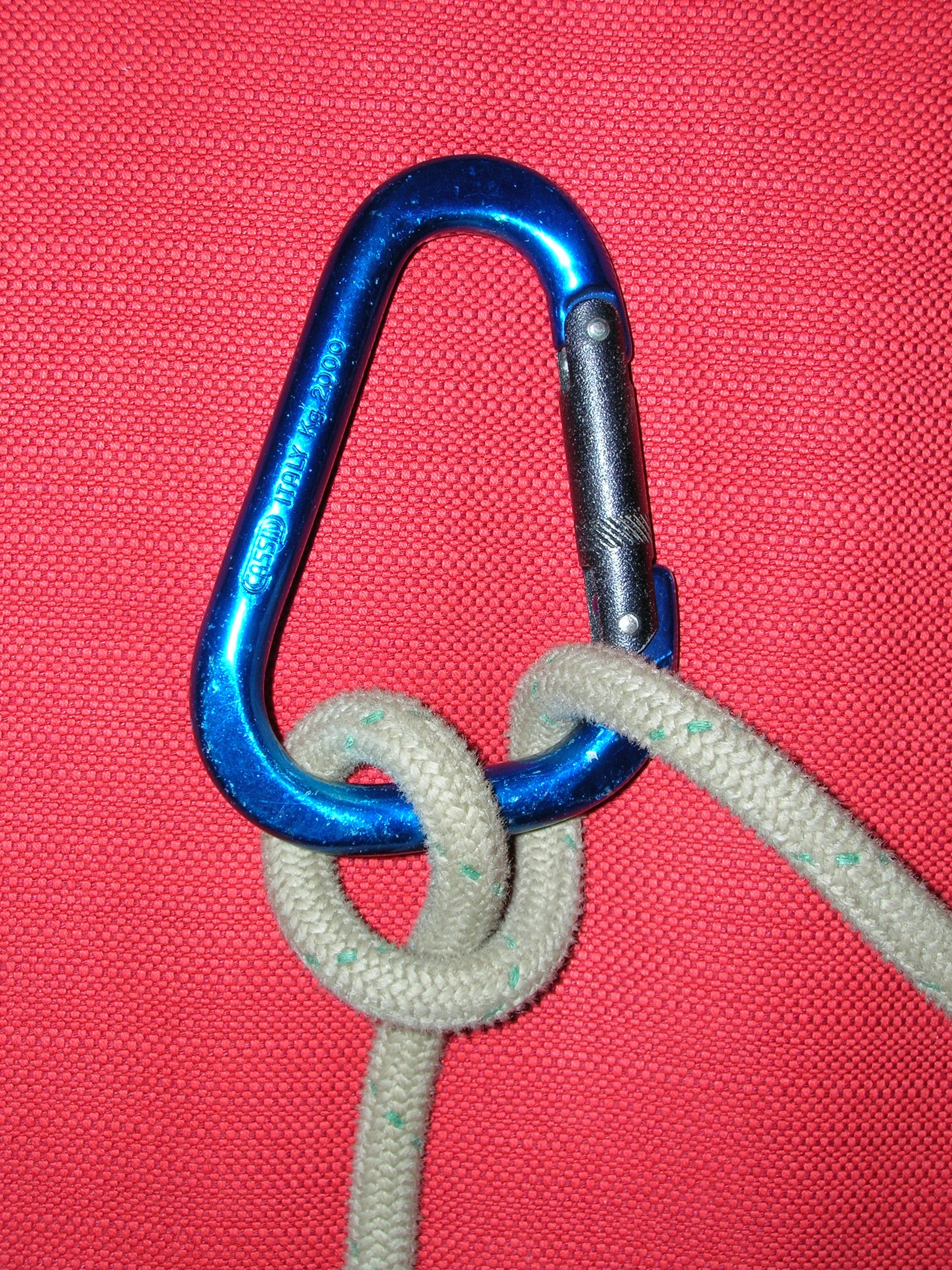 Nodo mezzo barcaiolo. Foto mia. Spero che la foto sia ribaltata per sbaglio in fase di upload, perchè mostra il modo *sbagliato* di fare il mezzo barcaiolo come anche dice il collega straniero, ed è inutilmente pericoloso e rischioso. Esso va invertito rispetto alla ghiera del moschettone, come per esempio mostrato qui: Mezzo Barcaiolo Corretto THIS MUNTER HITCH IS SHOWN IN THE WRONG CONFIGURATION AND MAY KILL THE SECOND IF THE BREAK LOADS THE GATE! HITCH SHOULD BE MADE IN THE REVERSE ON THE CARIBINER